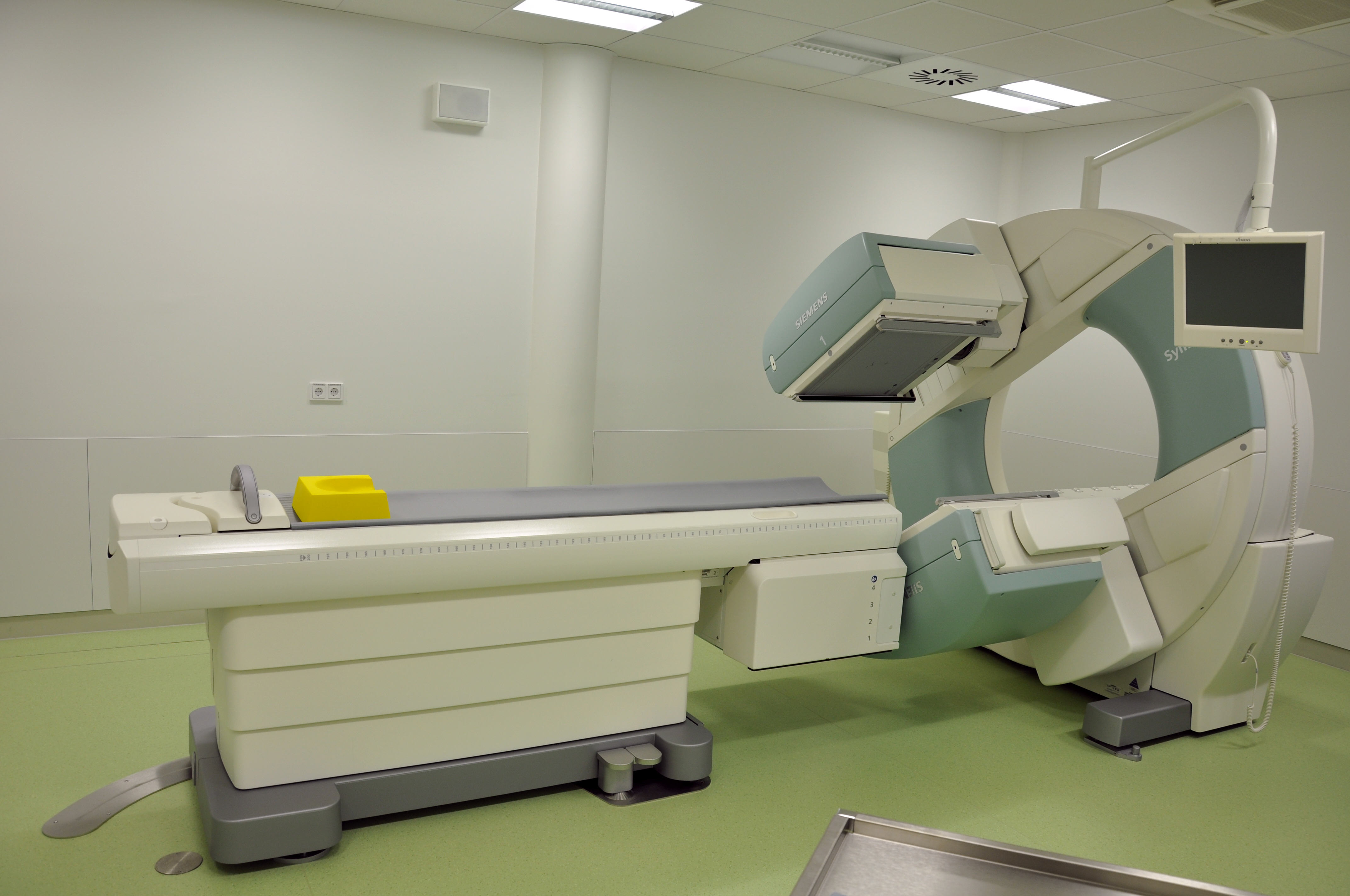 Ravensburg, Krankenhaus St. Elisabeth, Abteilung Radiologie, Gammakamera (am Tag der offenen Tür 2013)